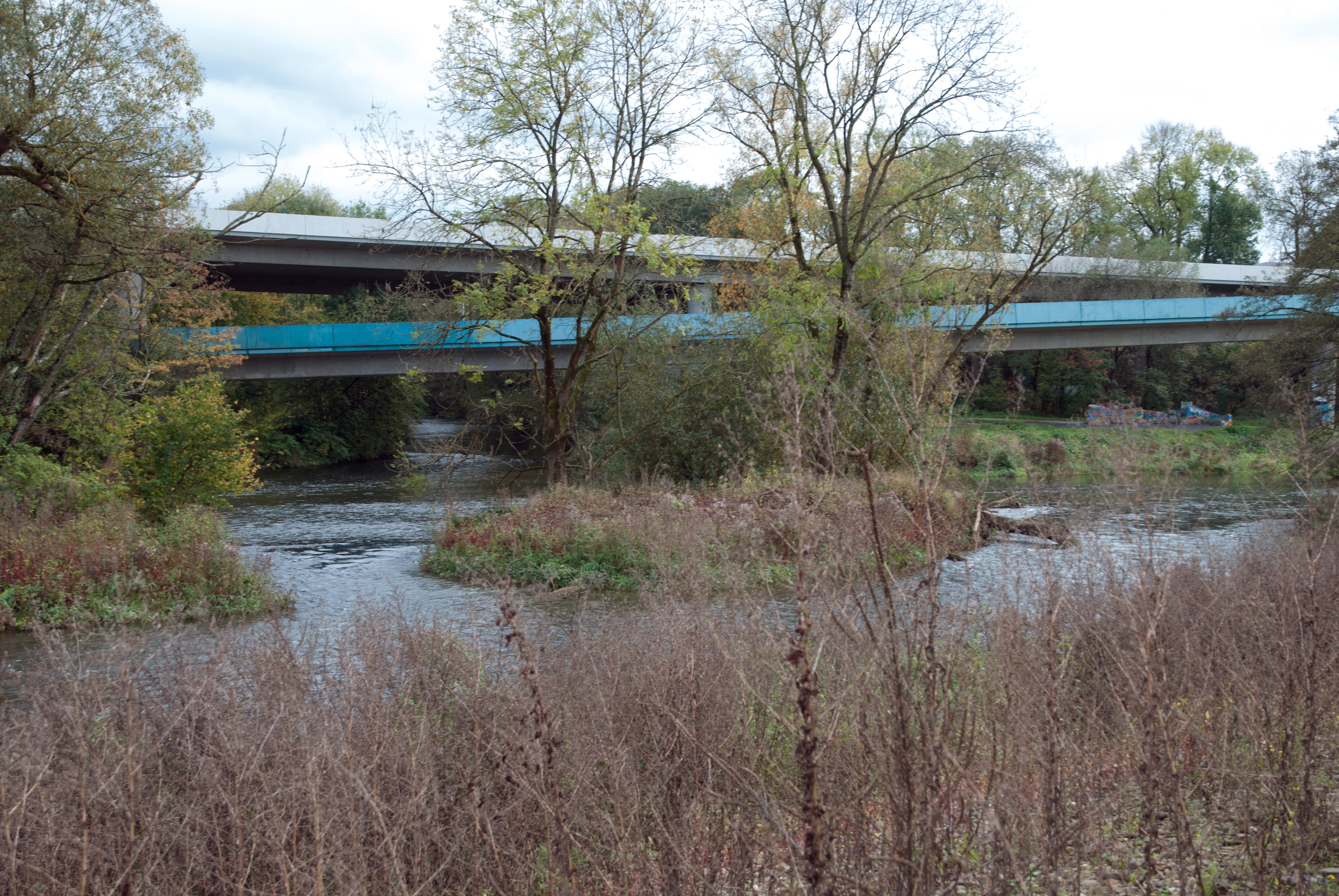 Neheim - Zusammenfluß von Ruhr und Möhne (im Bild hinten) Foto Totale